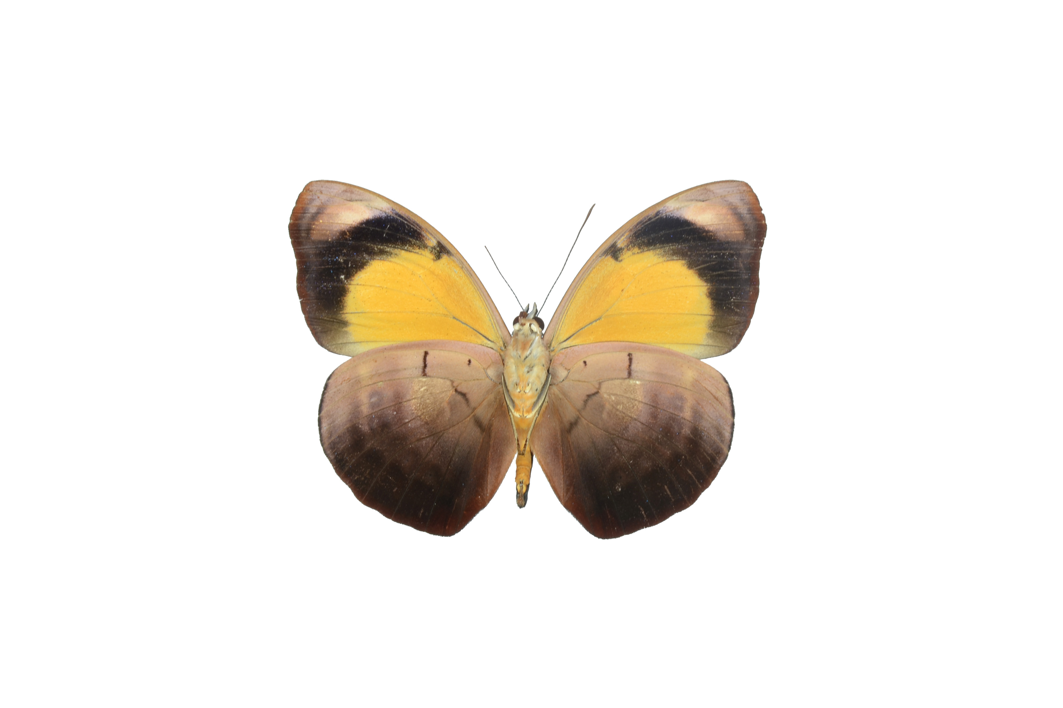 Nymphalidae eastern Ecuador